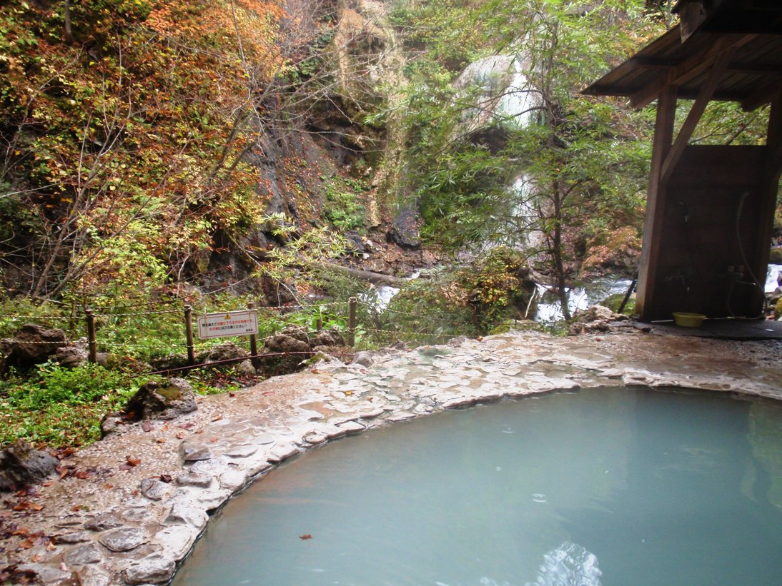 白骨温泉、公共野天風呂